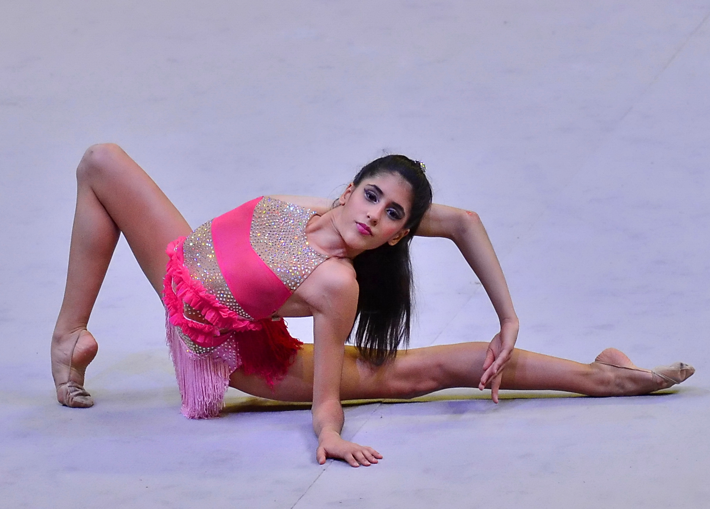 Mónica Alonso en una exhibición durante el Euskalgym 2013 en el Bilbao Arena el 10 de noviembre de 2013.